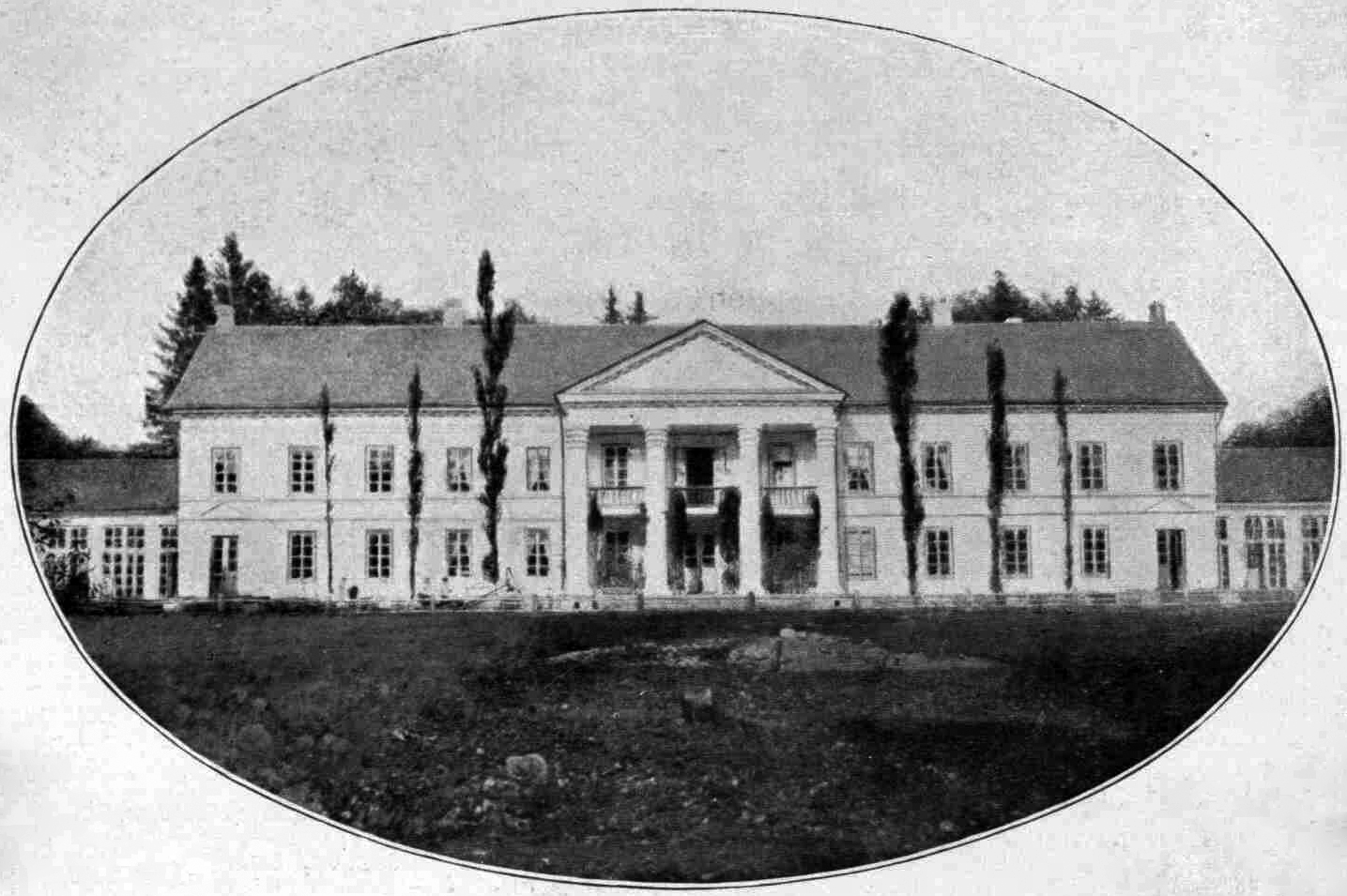 Беларуская (тарашкевіца): Дукора (Dukora), сядзіба Ашторпаў (Aštorp) і Гартынгаў (Harting)